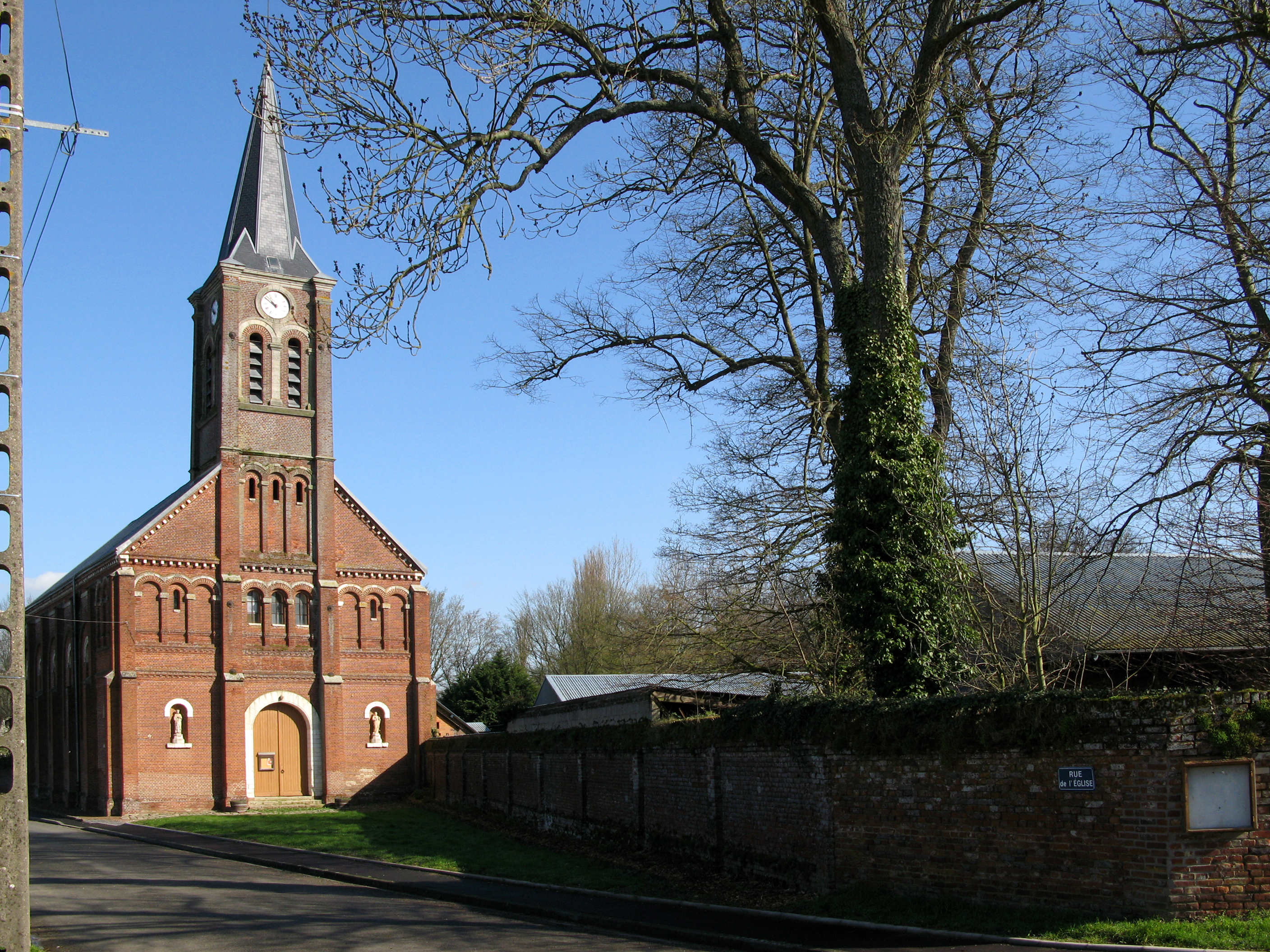 Baizieux (Somme, France) - L'église.